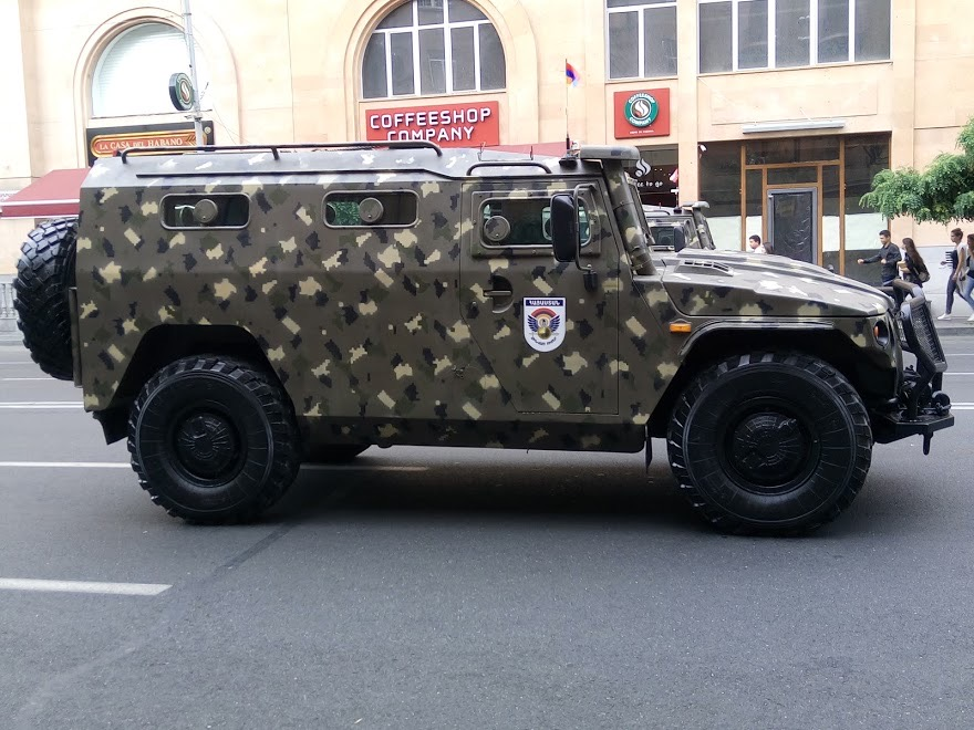 GAZ Tigr in Yerevan(2016)